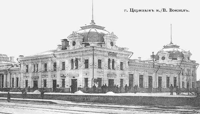 Центральный вокзал города Царицын (в настоящее время Волгоград-1)